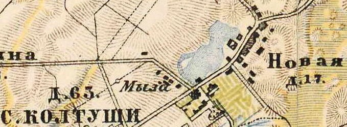 План села и мызы Колтуши. 1885 г.